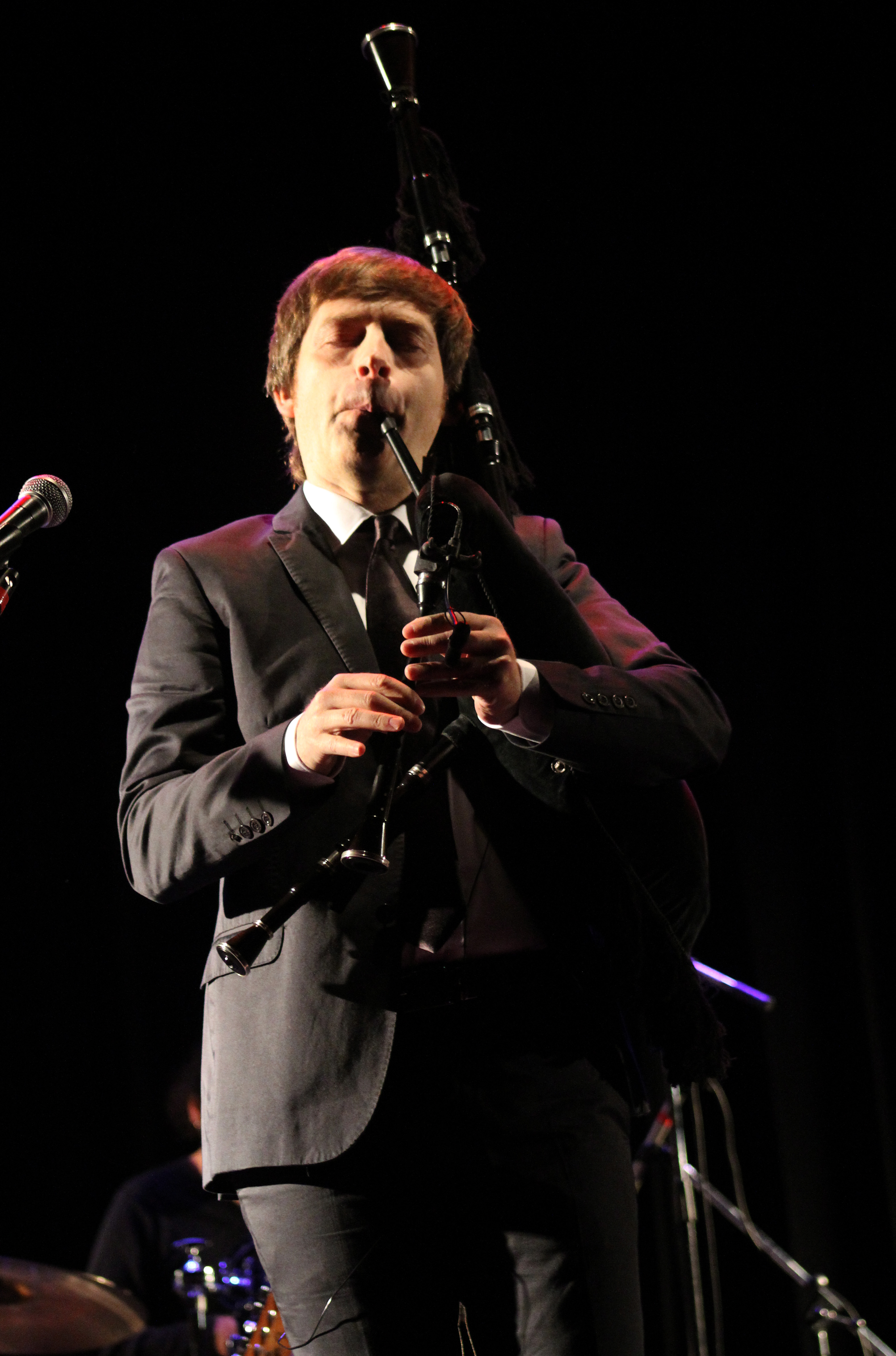 Mar del Plata, 17 de Mayo de 2014. En el marco del MICSUR, se llevó a cabo el espectáculo que pretende mostrar la creatividad musical de Galicia, a través de un elenco de reconocidos artistas gallegos, con un repertorio desde lo tradicional hasta lo contemporáneo.Los artistas del espectáculo son UXIA, Rosa Cedrón, Budiño y Narf.